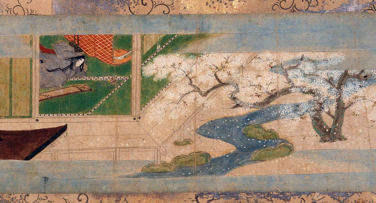 Utatane soshi emaki, 15.4 x 878.1 cm, musée national de l'histoire du Japon de la préfecture de Chiba (Kokuritsu Rekishi Minzoku Hakubutsukan). Attribué à Tosa Mitsunobu (actif 1469-1522).